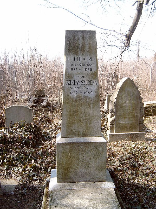 Föld Aurél; Feld (Bp., 1877. okt. 6.–Bécs, 1970. nov. 17.) újságíró, színházigazgató, fordító és Sziklai Szeréna (Bp., 1879. jan. 2.–?) alt hangfekvésű énekesnő sírja Budapesten. Kozma utcai izraelita temető: 11-31-22.